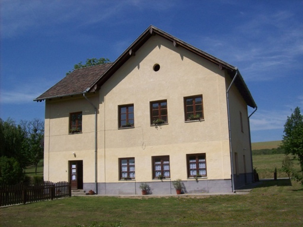 Almamellék vasútállomása 2012-ben